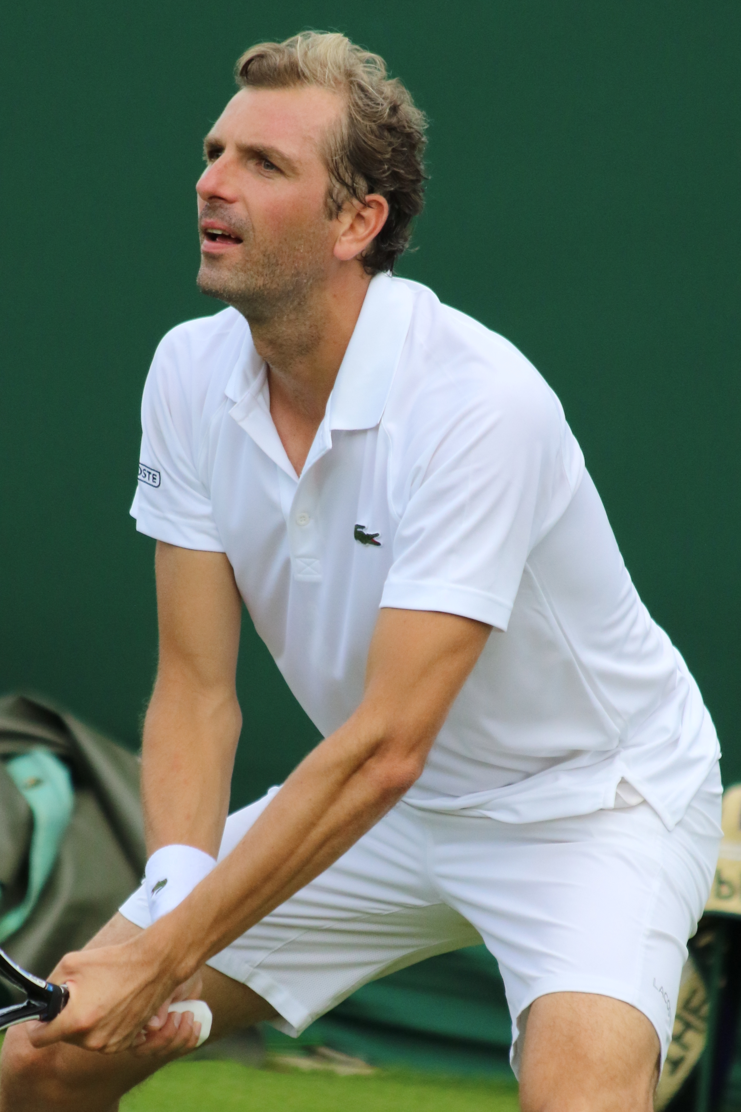 Benneteau WM17 (6)